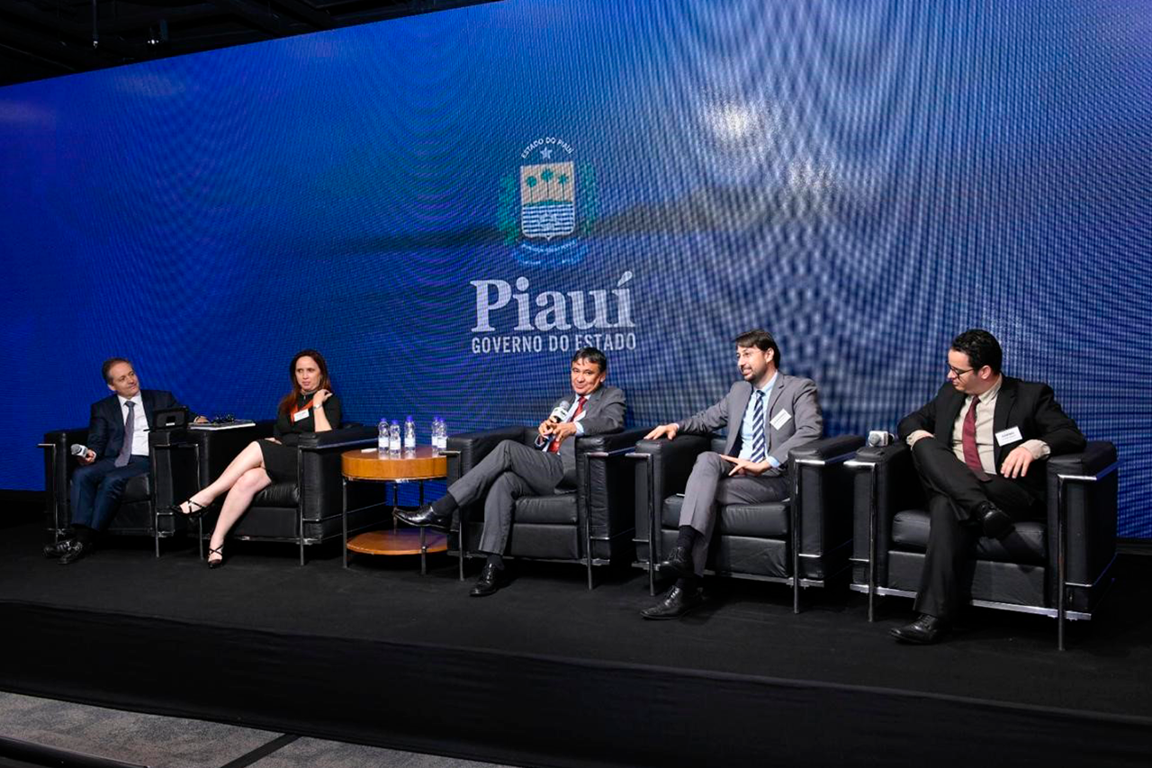 IPGC e Governo do Piauí participam de roadshow para PPP de usinas solares em evento do GRI Club Brazil